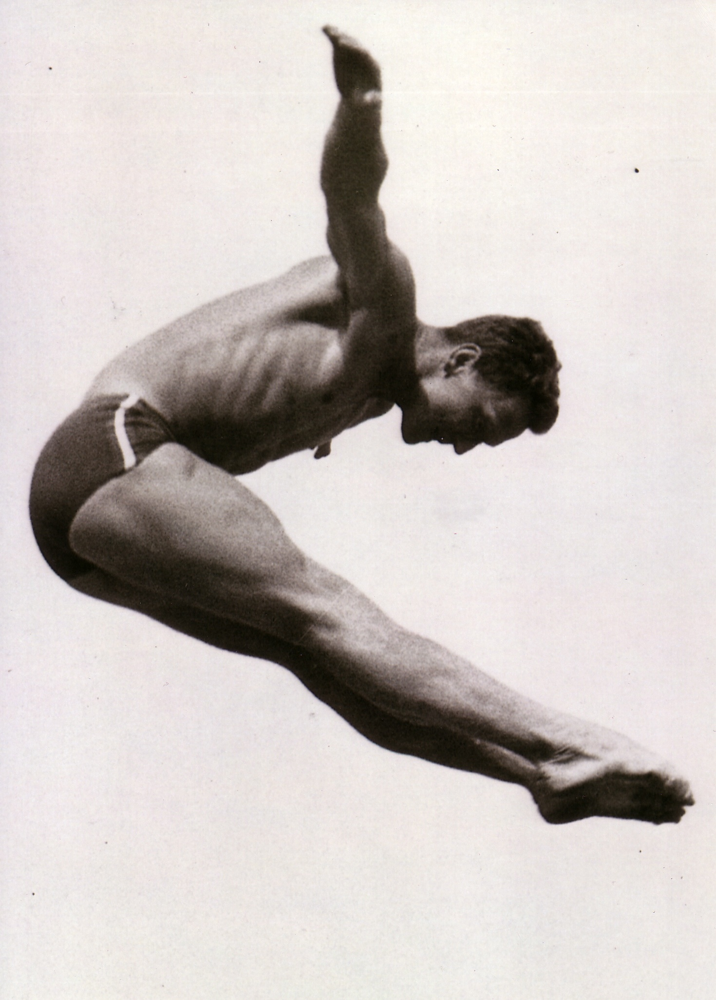 Olympische Spiele Tokyo